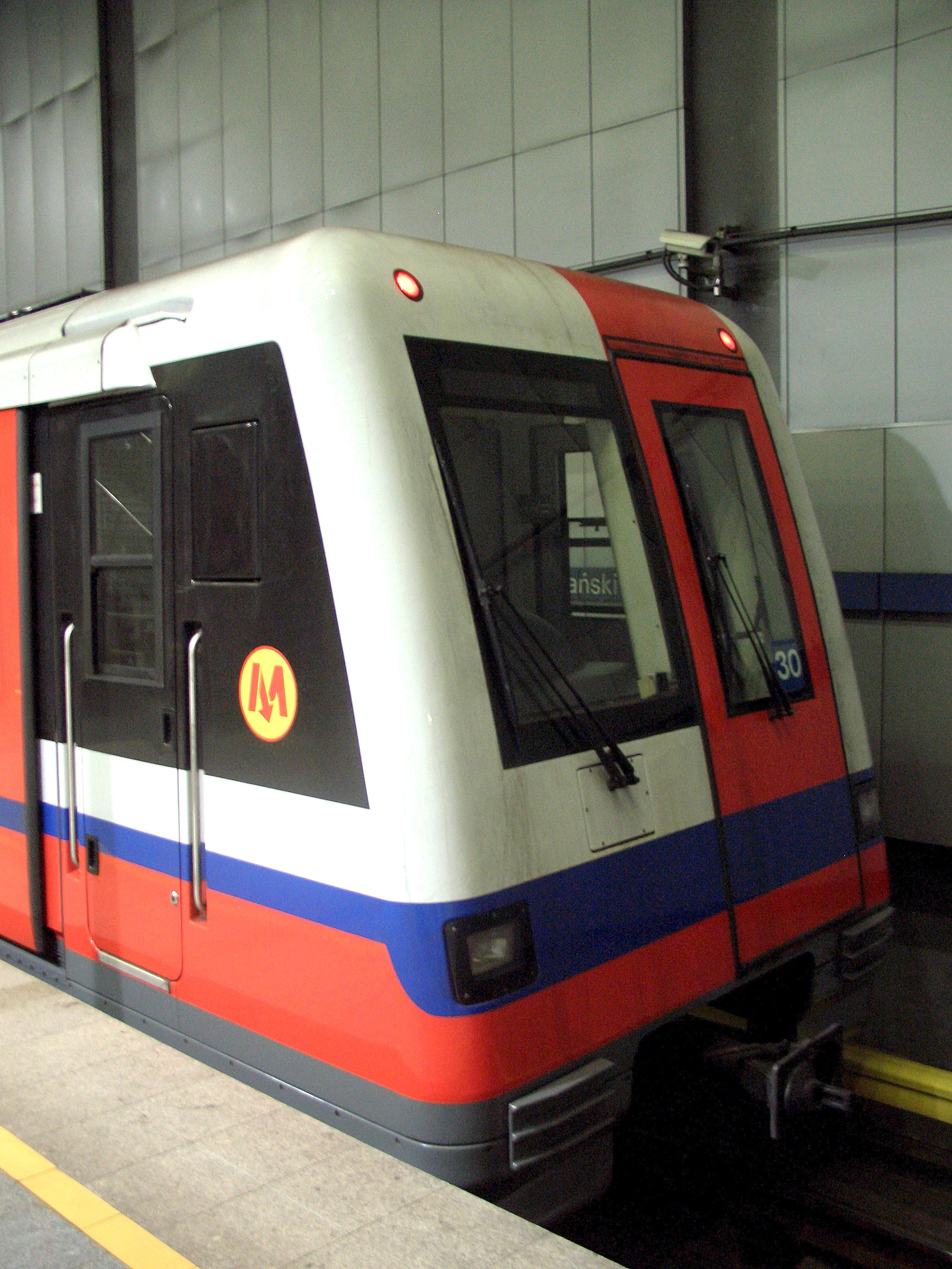 Alstom "Metropolis" Train on Warsaw Metro Dworzec Gdanski station.